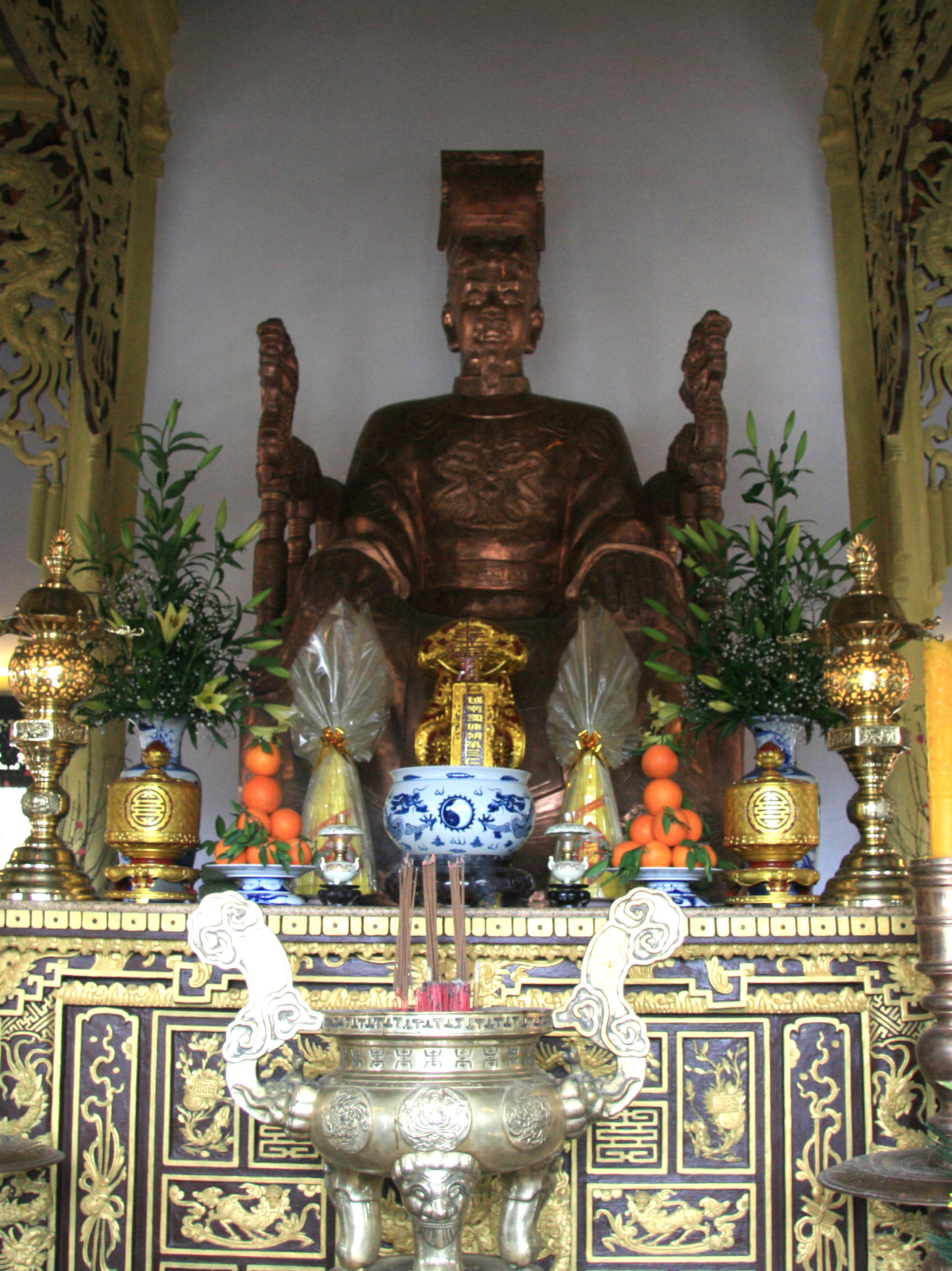 Nhân Tông Thể loại:Thái thượng hoàng nhà Trần Thể loại:Người Nam Định Thể loại:Hình truyền lên bởi thành viên Lưu Ly